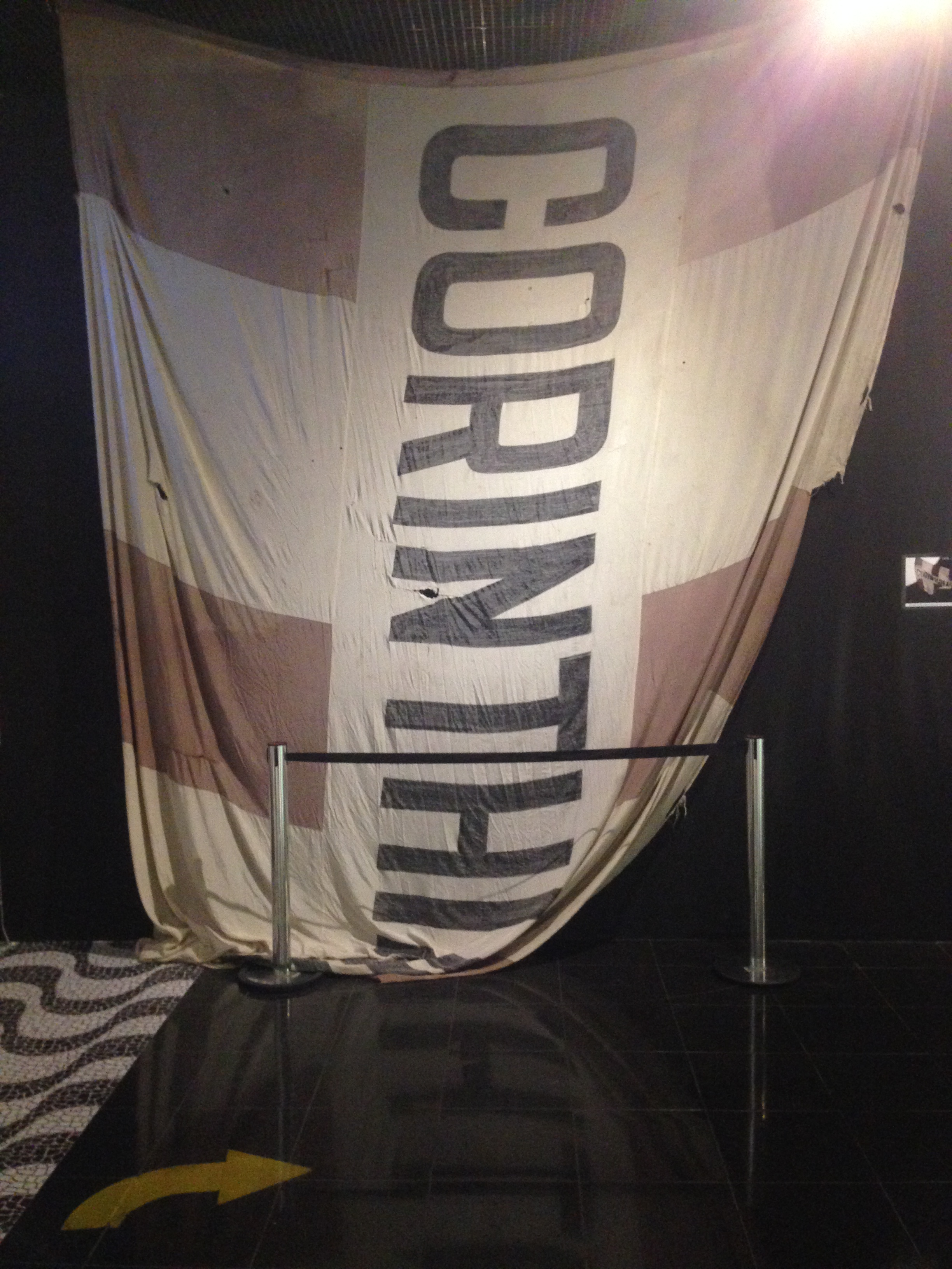 Foto tirada por mim no memorial do corinthians